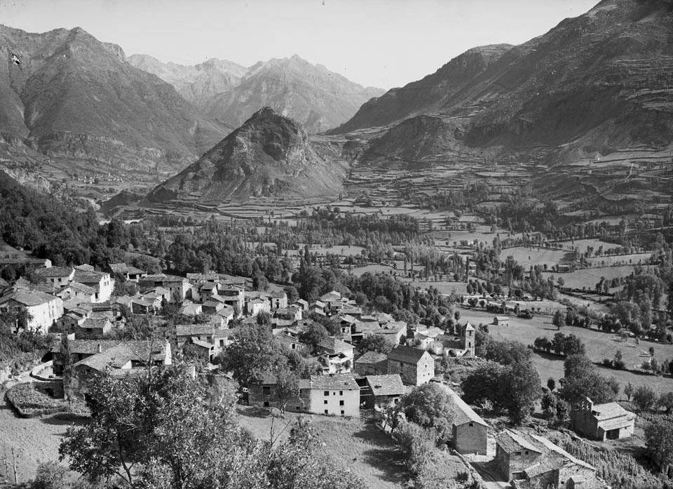 Imatge